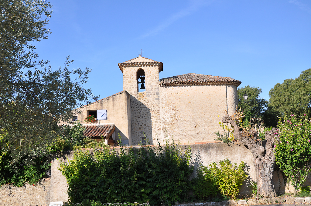 Chapelle romane à Saint-Laurent-du-Verdon